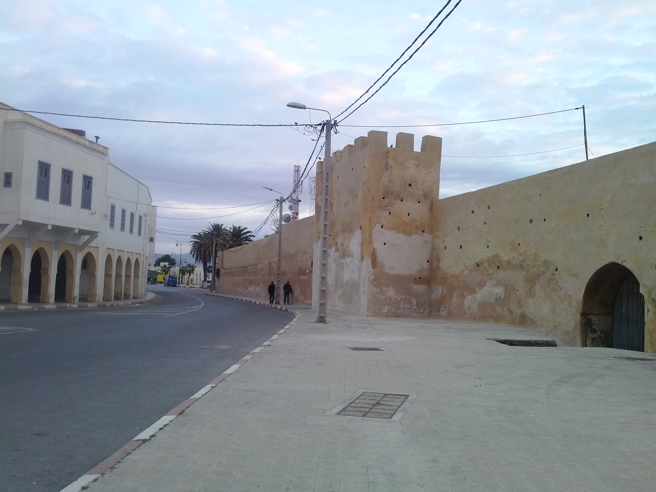 Ancien Medina de TAZA